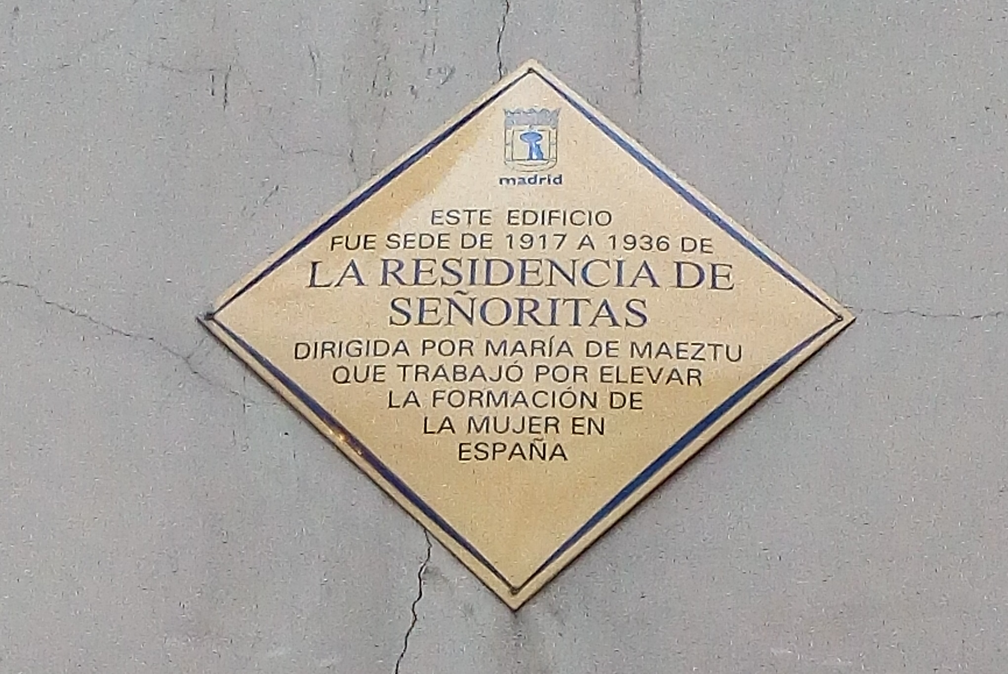 Placa en el edificio que fue la sede de la Residencia de Señoritas de Madrid del 1917 a 1936 en Madrid y que fomentaba a través de María de Maeztu los estudios universitarios de las mujeres en España.